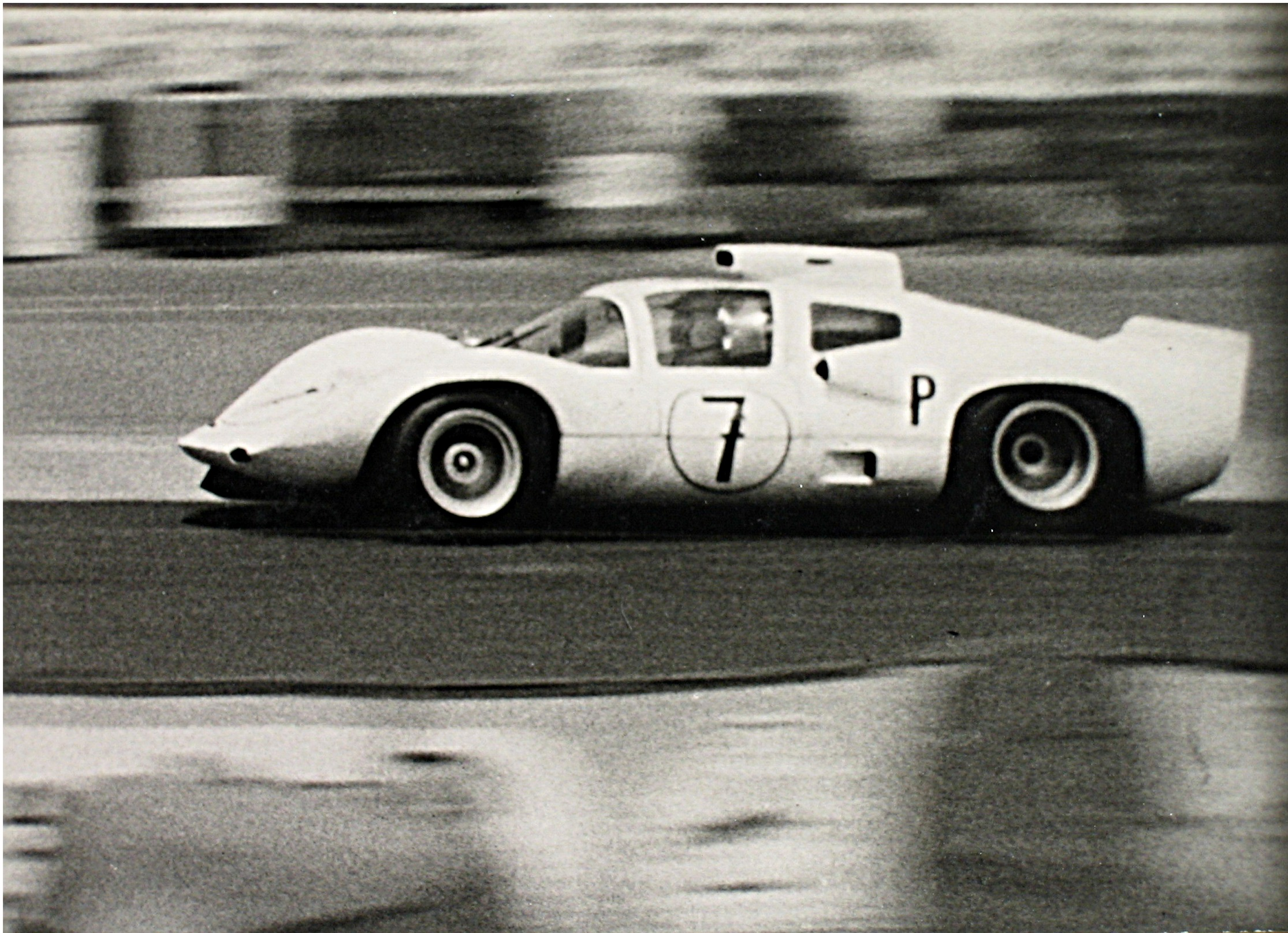 Chaparral auf der Zielgeraden des Nürburgrings beim Training zum 1000-km-Rennen, gefahren von Joakim Bonnier